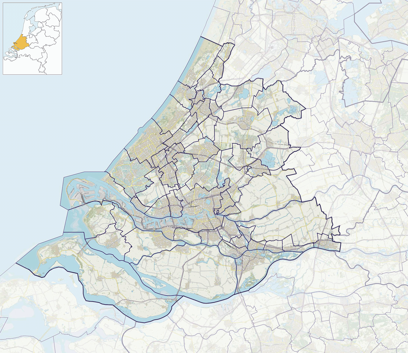 Positiekaartje van de provincie, variant "gemeentelabels"